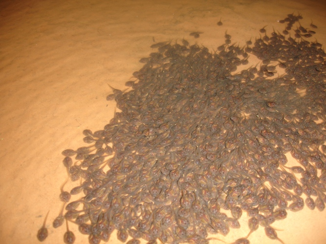 Bufo schneideri